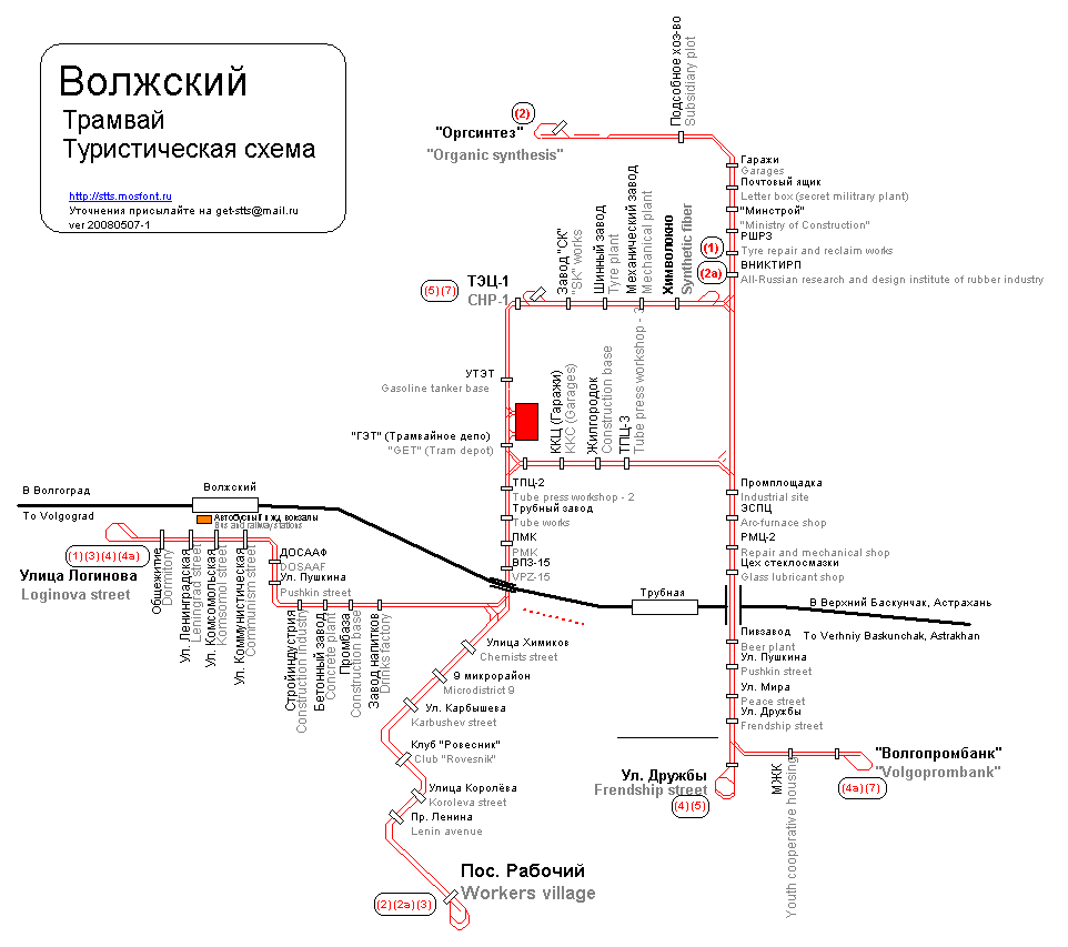 Схема путевого развития Волжского трамвая